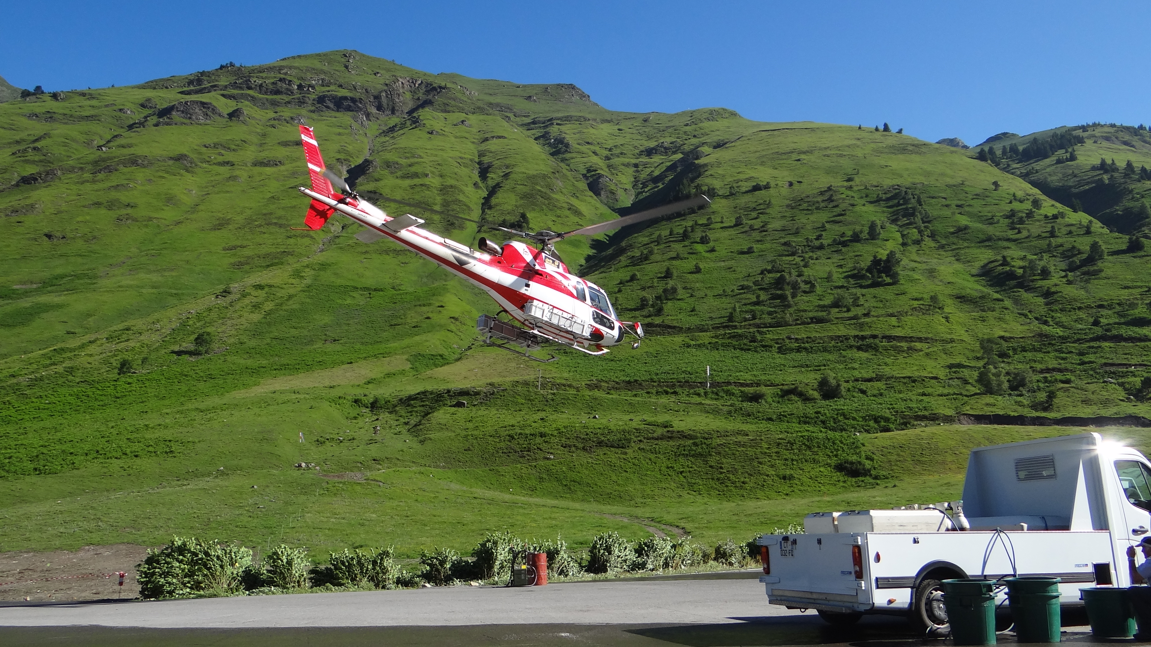 Réempoisonnement des lacs suite à la crue du Bastan